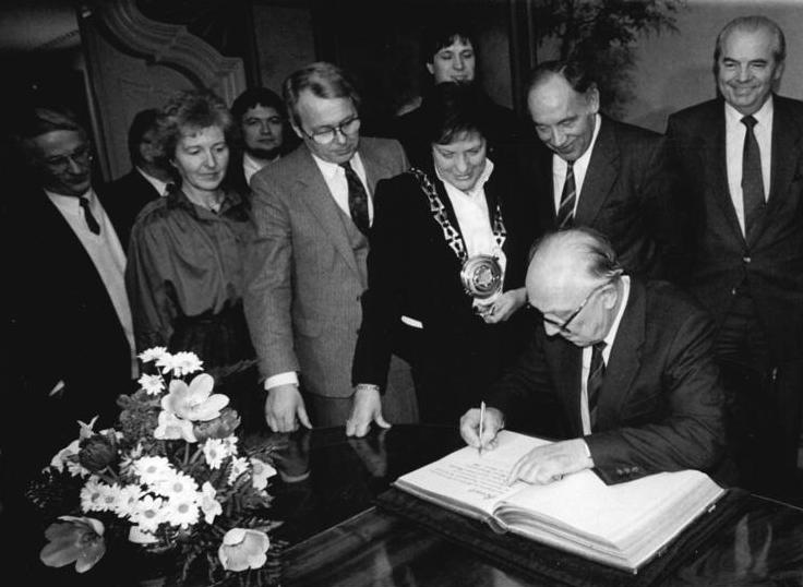 ADN-ZB/Koard-21.2.1986 BRD: Besuch VK-Delegation Nach einer Besichtigung des historischen Zentrums Engelshaus in der Geburtsstadt von Friedrich Engels Wuppertal-Barmen trug sich Horst Sindermann, Präsident der Volkskammer der DDR, Mitglied des Politbüros des ZK der SED und Stellvertreter des Vorsitzenden des Staatrates, in das "Goldene Buch" der Stadt ein (links stehend Oberbürgermeisterin Ursula Kraus). 1.v.r.(stehend) der Leiter der Ständigen Vertretung der DDR in der BRD, Botschafter Ewald Moldt.